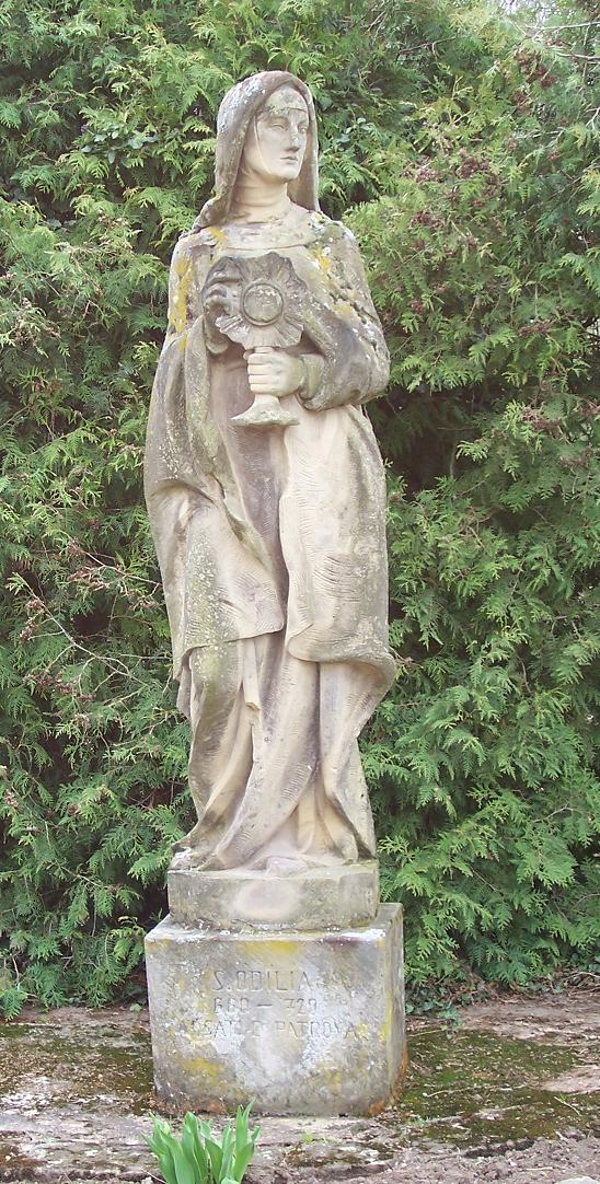 Sainte Odile Patronne d'Alsace. Cette représentation de sainte Odile est peu commune. Dompeter - Avolsheim (France-Alsace)